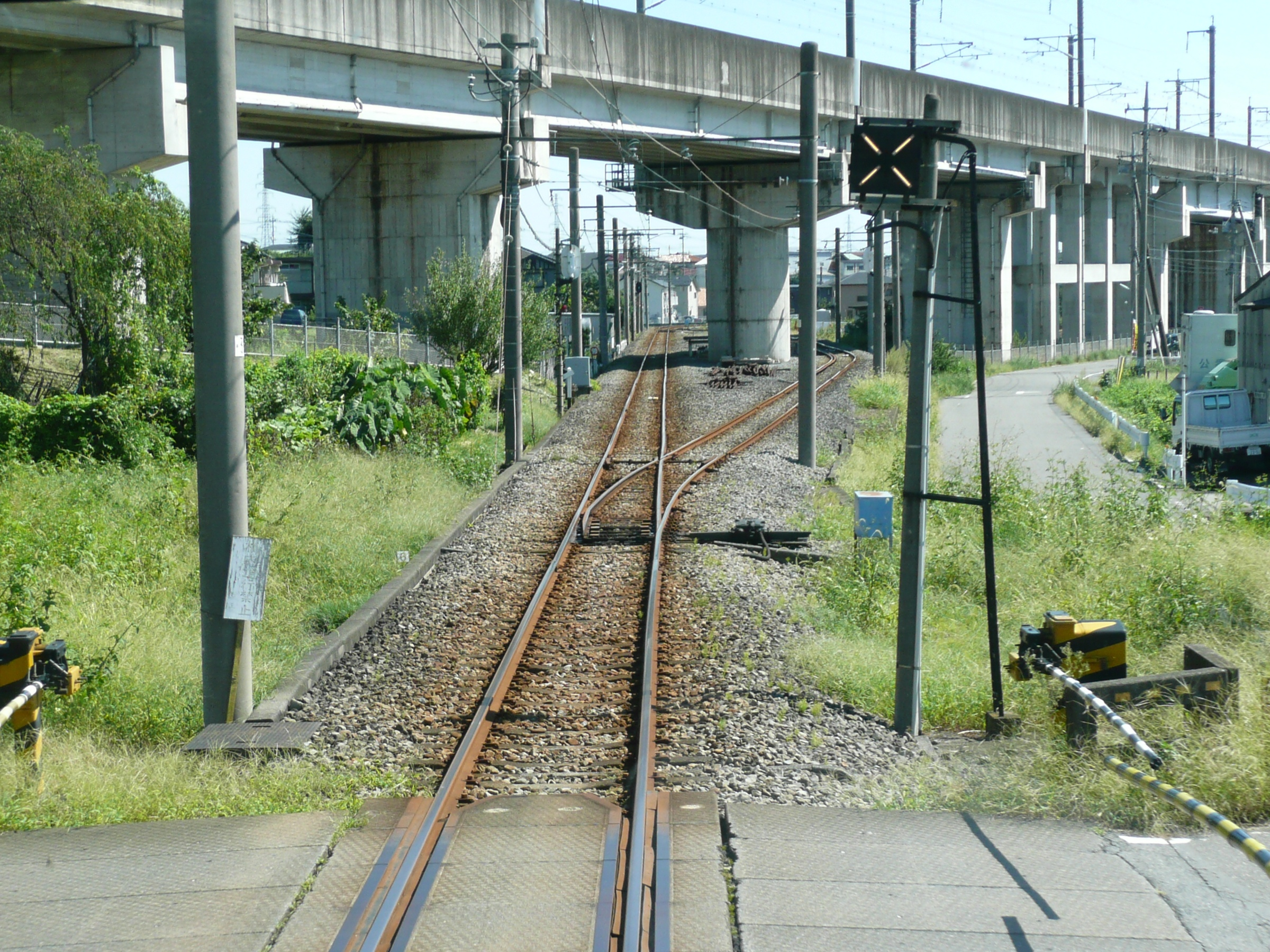 上信電鉄上信線佐野信号所（高崎方から撮影）